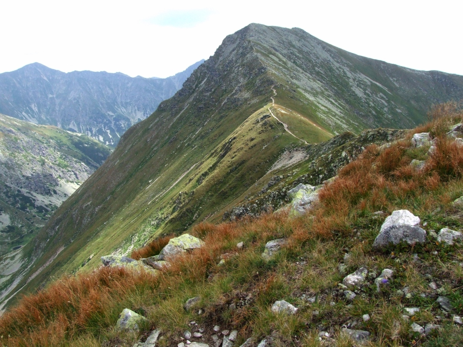 Jakubina (Tatry Zachodnie). Widok z Jarząbczego Wierchu